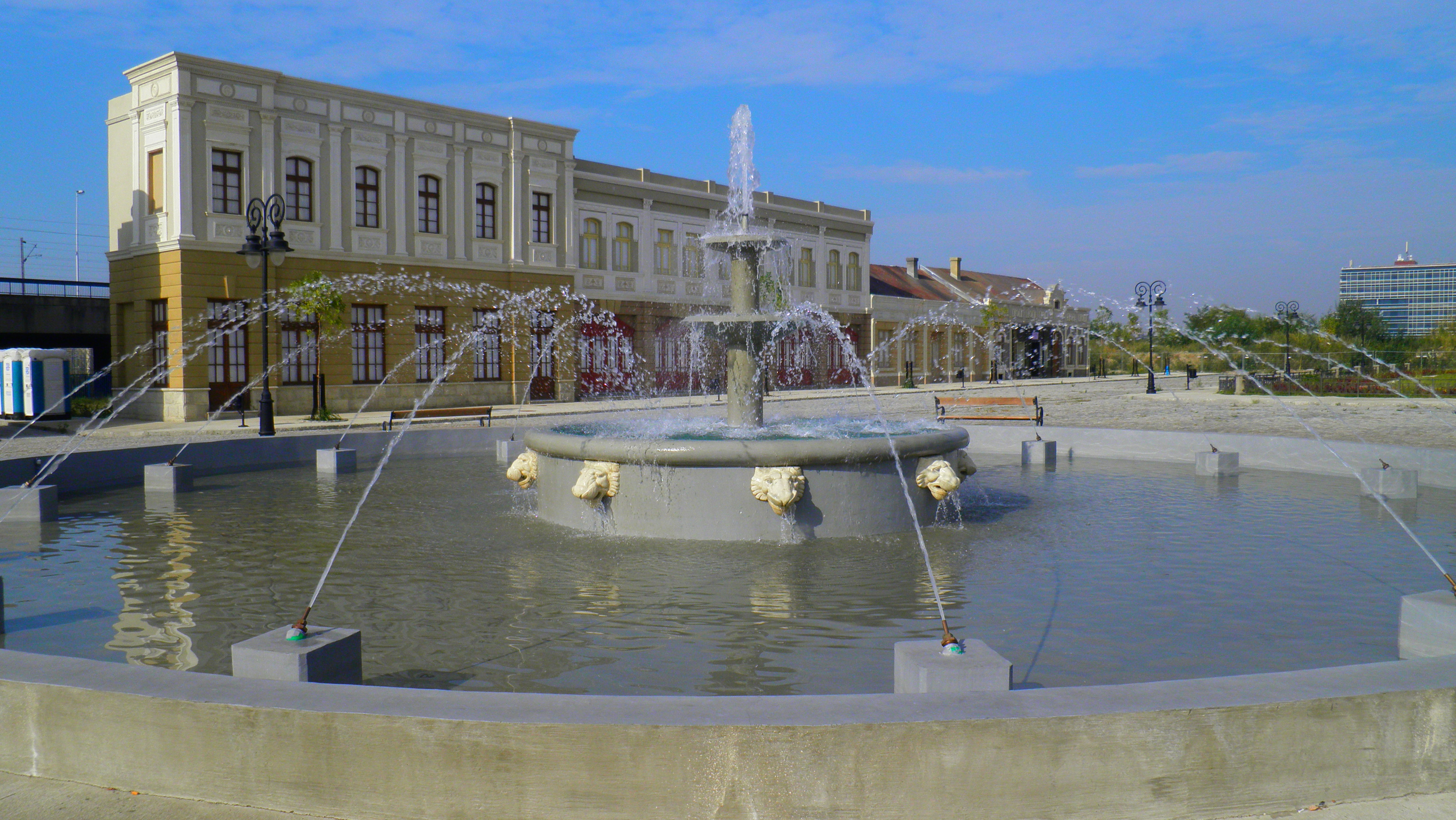 Beogradizacija Beograda